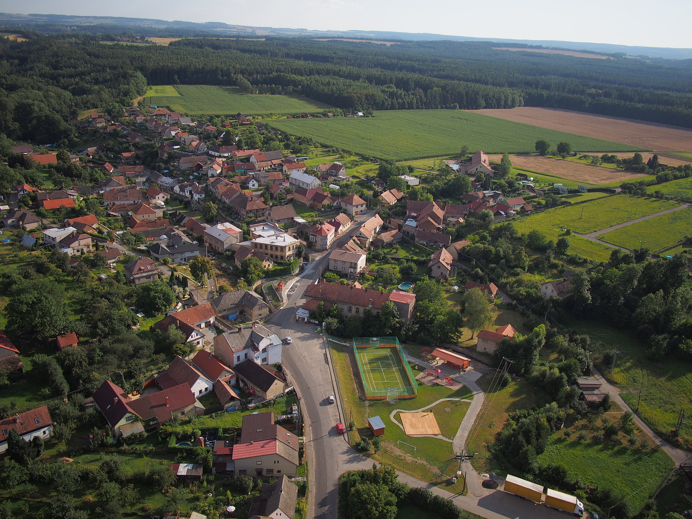 Celkovy pohled na obec Hroubovice